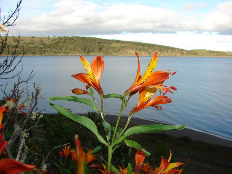 Fotografiada en la peninsula Brunswick un poco al sur de Fuerte Bulnes (zona de Gavilea kingii que buscabamos afanosamente)